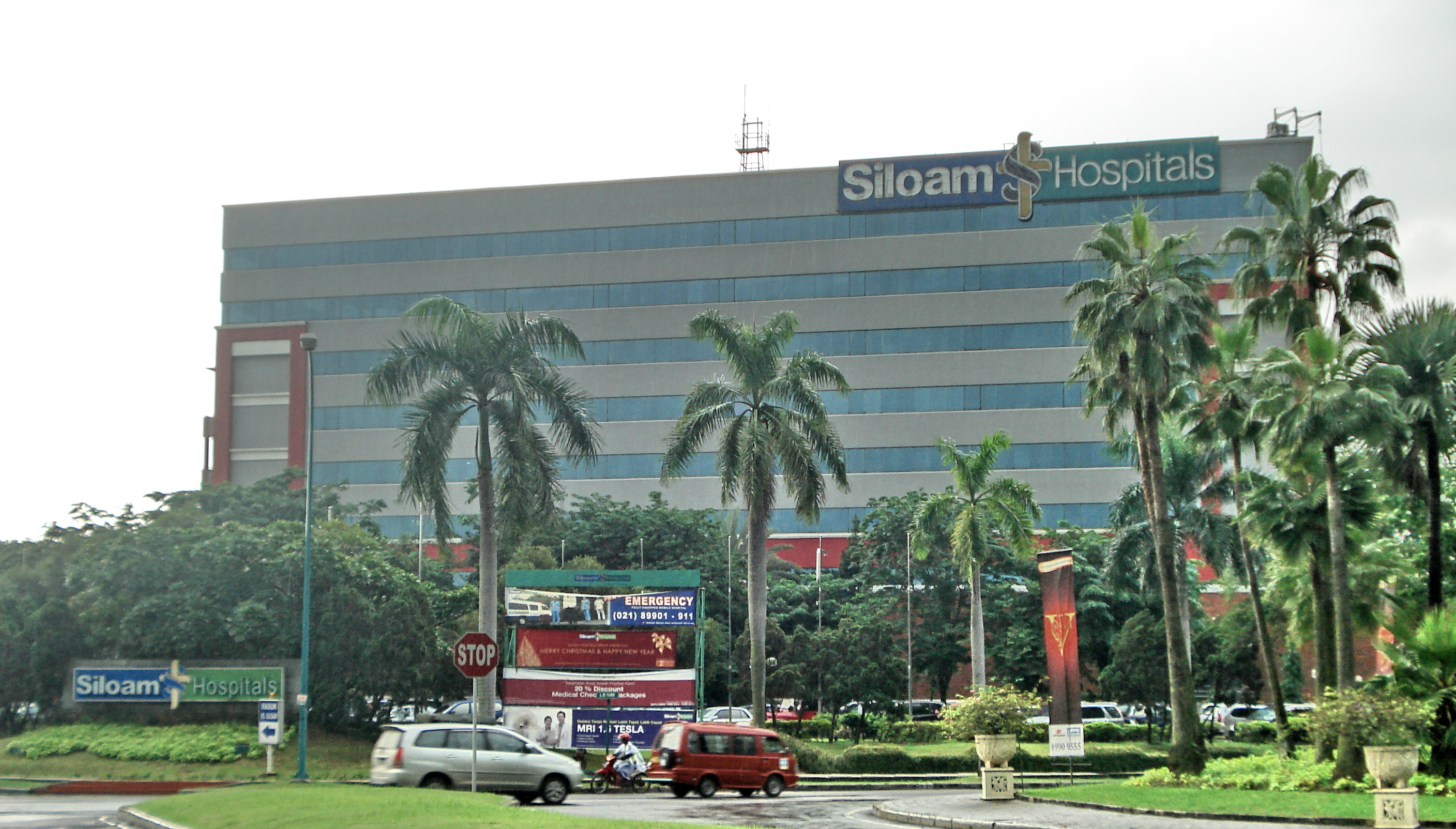 Siloam Hospitals Lippo Cikarang